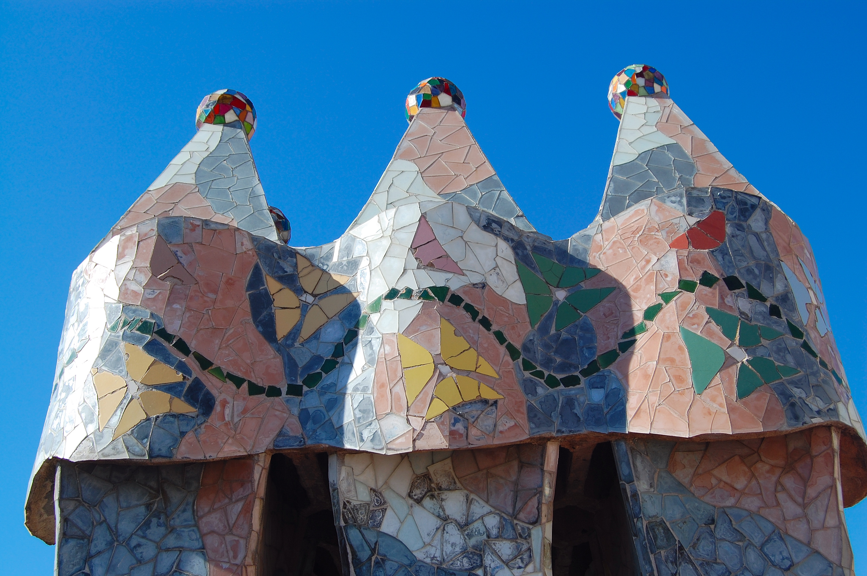 Casa Batlló - Barcellona Antoni Gaudi